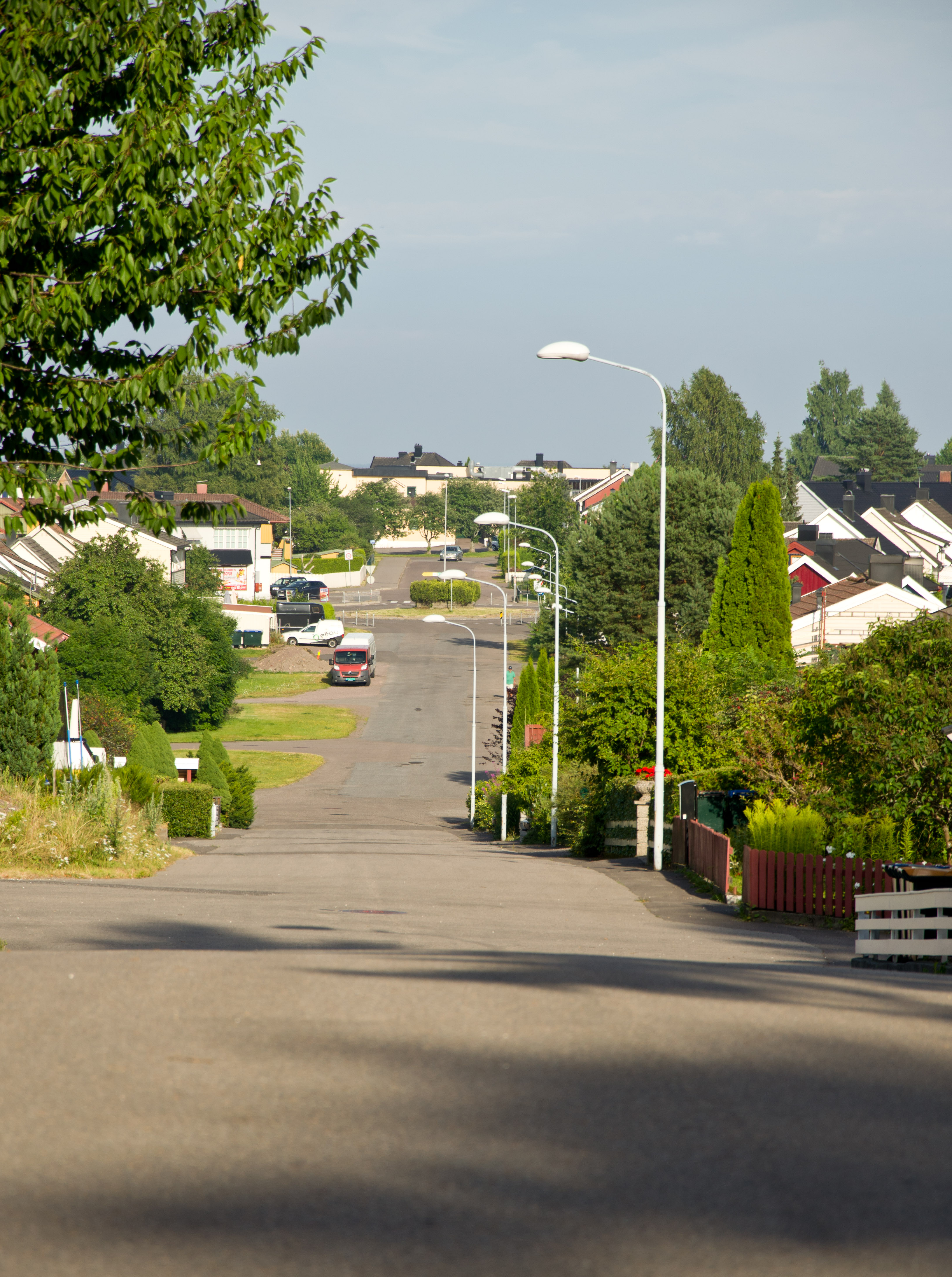 Fylkesvei 3192 (tidligere 704) Johan Sollies gate, Horten